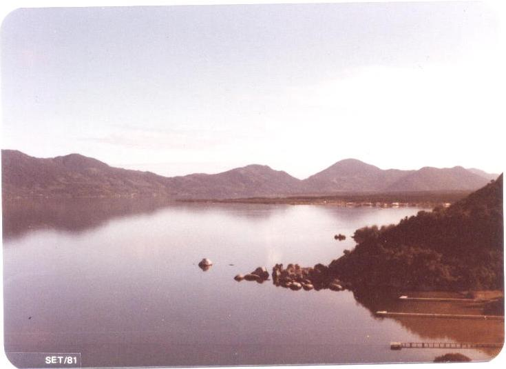 A Lagoa em dia de calmaria, vendo-se os morros da Costa ao fundo. Foto tirada por Cesário Simões Junior em 1981 para o "Projeto de Tombamento do Caminho da Costa da Lagoa".